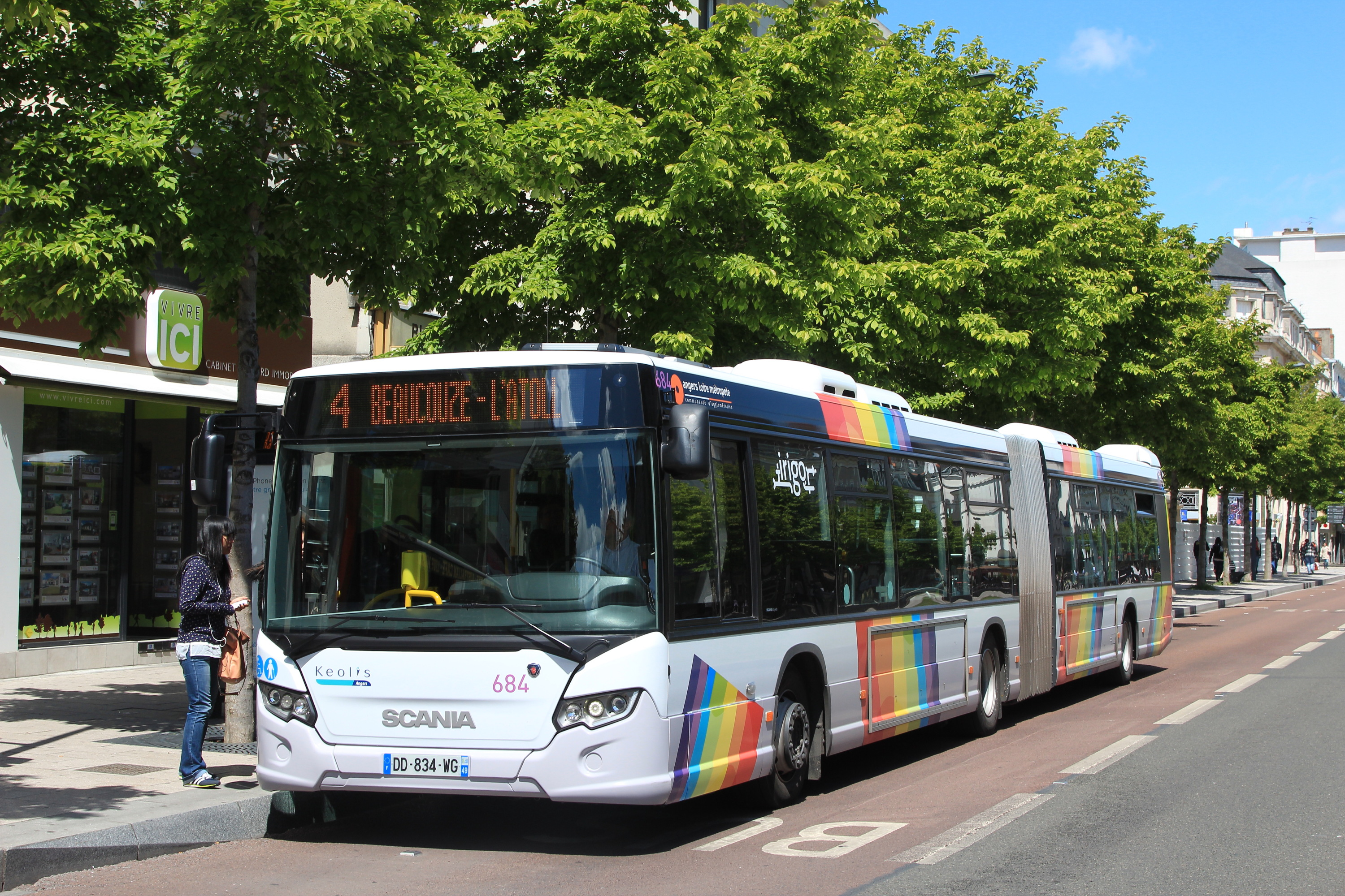 Le bus Scania Citywide articulé n°684 sur le boulevard du Maréchal Foch, dans le centre-ville d'Angers.